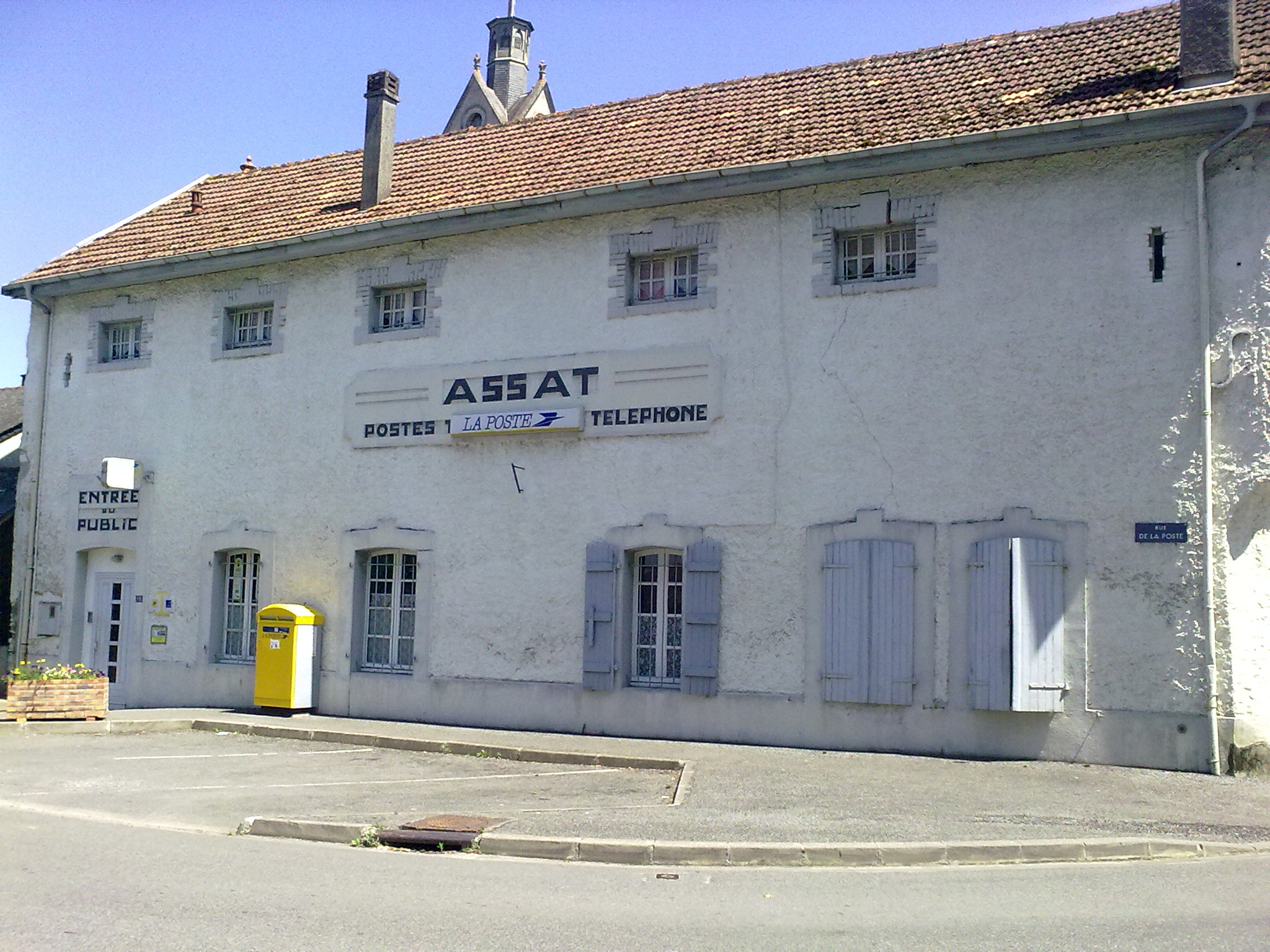 Assat, la poste.